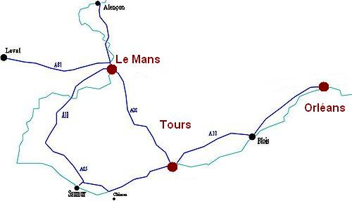 géographie de l'espace metropolitain maine val de loire